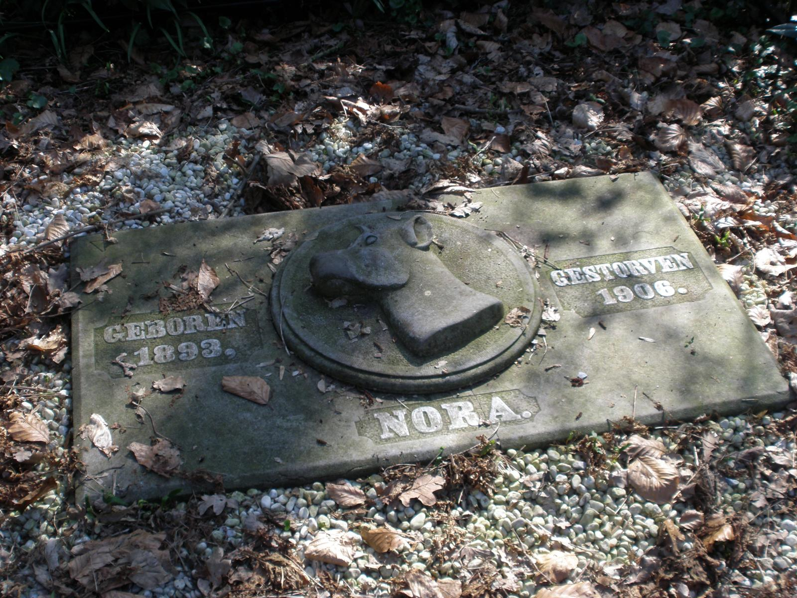 Graf van de hond van Paulina le Fèvre de Montigny - Bisdom van Vliet in Park De Overtuin in Haastrecht.